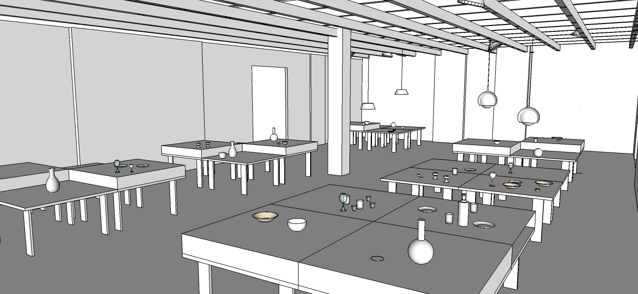 Vista prospettica del padiglione finlandese allestito da Timo Sarpaneva e presentato all'interno delle Sezioni Nazionali alla XI edizione della Triennale di Milano